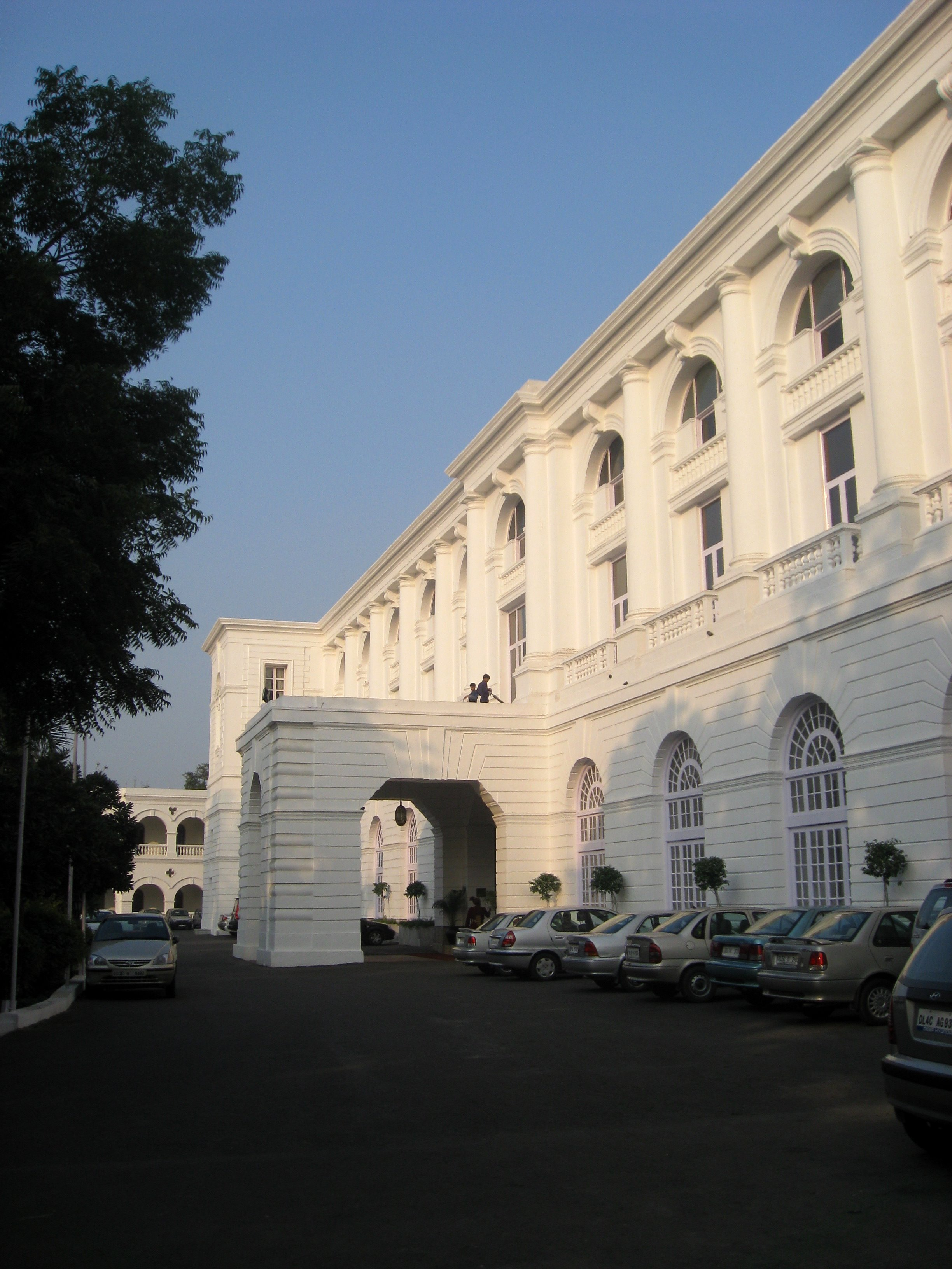 Oberoi Maidens Hotel, Delhi.